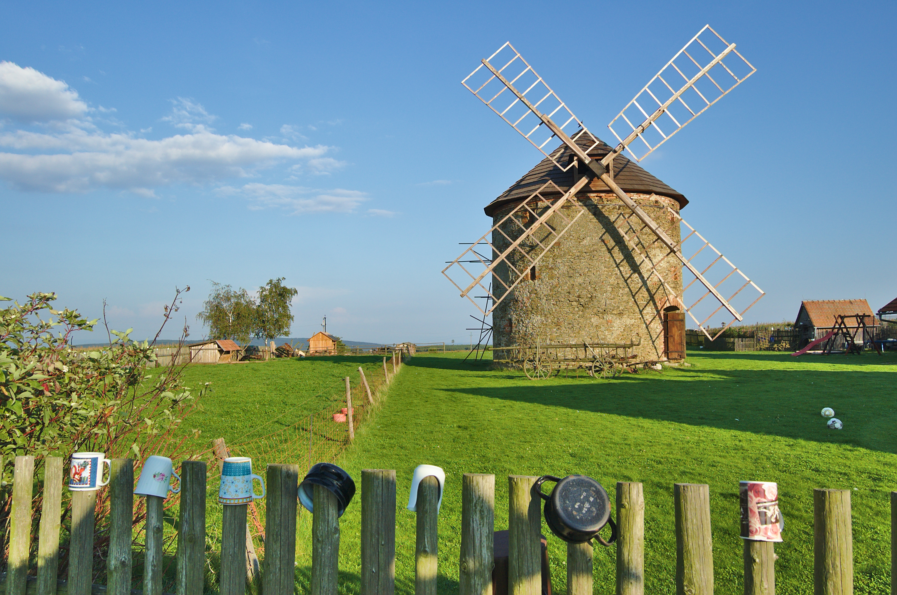 Větrný mlýn, Přemyslovice, okres Prostějov